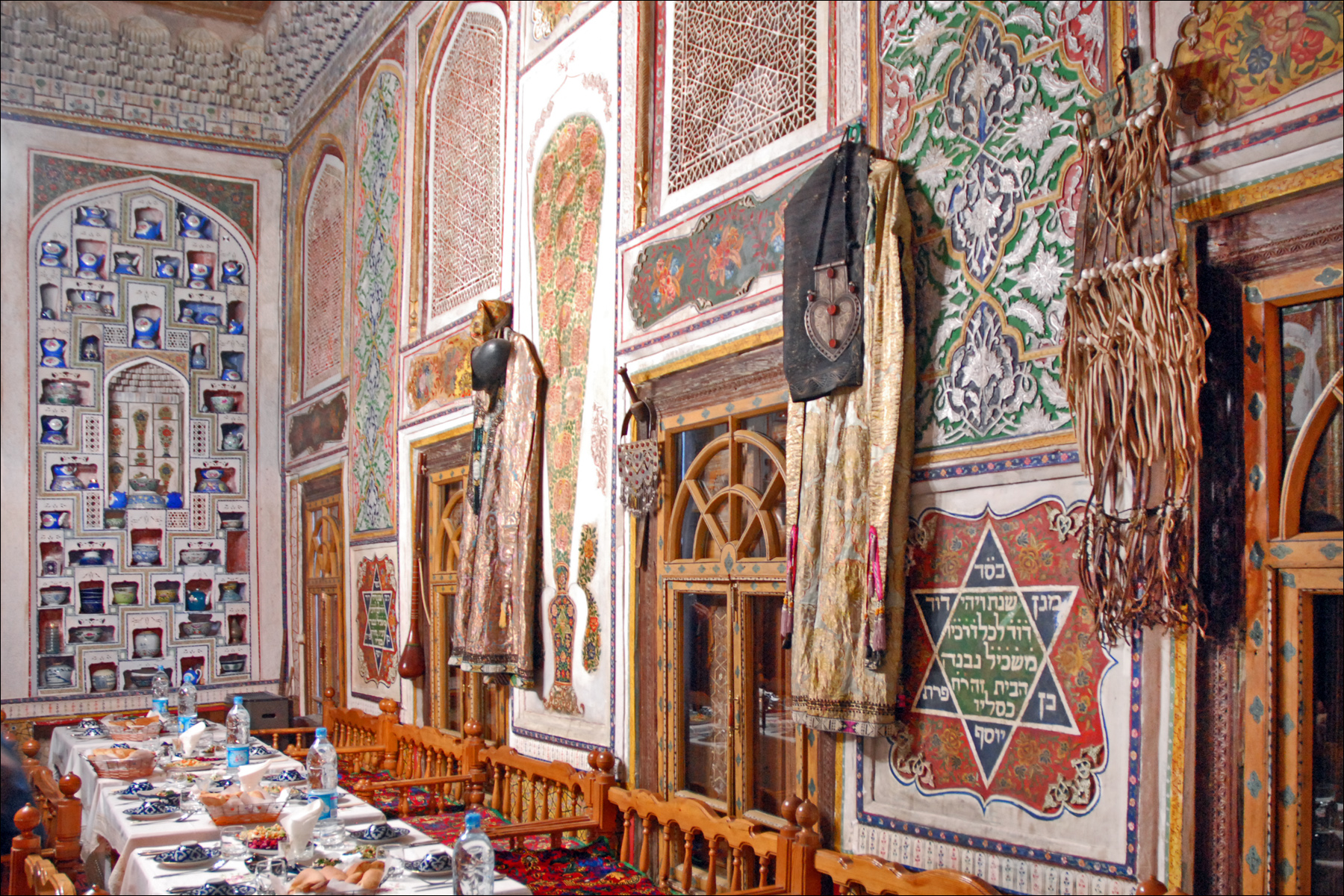 Le quartier juif de la vieille ville de Boukhara s'étendait au sud de la place Liab-i-Haouz. La communauté juive de Boukhara était d'environ 4.000 personnes en 1832. Sous le pouvoir du Khan, les juifs subissaient des contraintes importantes. Ils devaient porter un bonnet de fourrure carré, une cordelette autour du cou, ils ne pouvaient monter à cheval à l'intérieur des murs, ils payaient des impôts supplémentaires, etc. Au moment de l'Indépendance vis à vis de la Russie, la plupart des juifs ont quitté l'Ouzbékistan, le plus souvent pour aller habiter en Israël. Leurs maisons ont été rachetées par des ouzbeks, comme celle photographiée ci-dessus qui appartient à un commerçant de suzanis et qui organise ponctuellement des repas pour des étrangers.